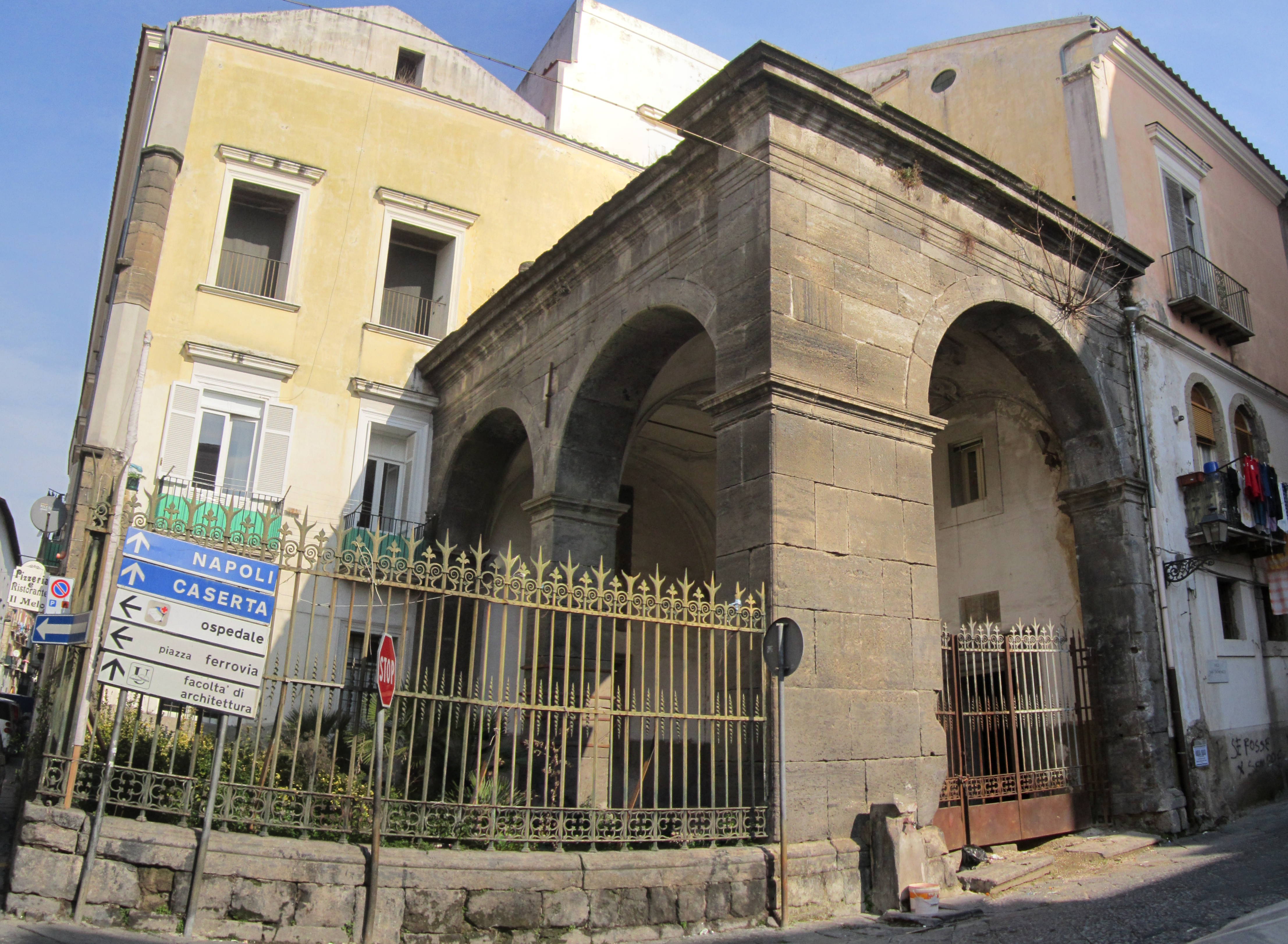 Sedile di San Luigi